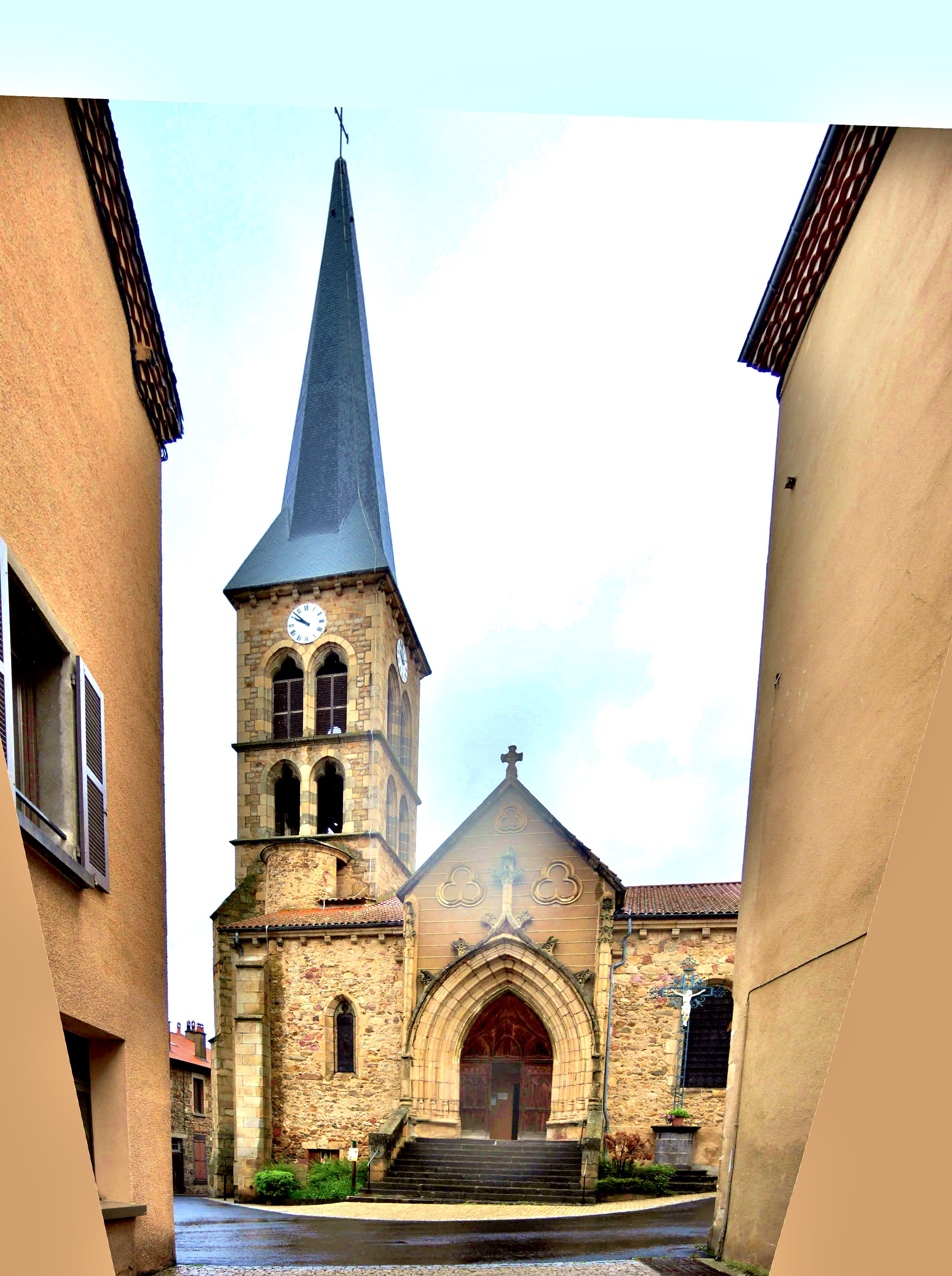 Porche et clocher de l'église de Sauxillanges. Puy-de-Dôme.